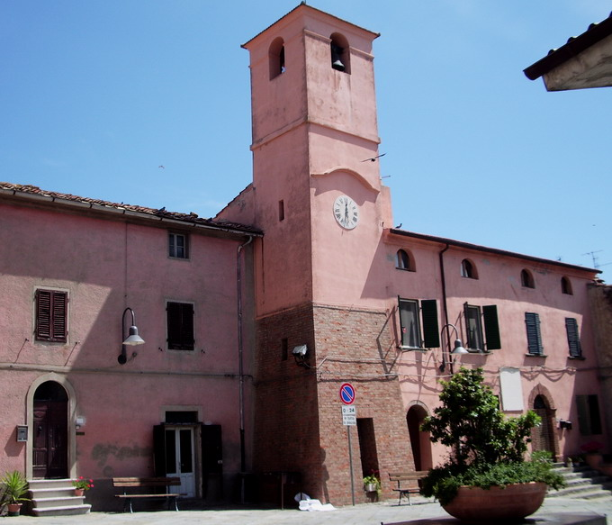 Torre dell'Orologio a Montiano, frazione di Magliano in Toscana, provincia di Grosseto